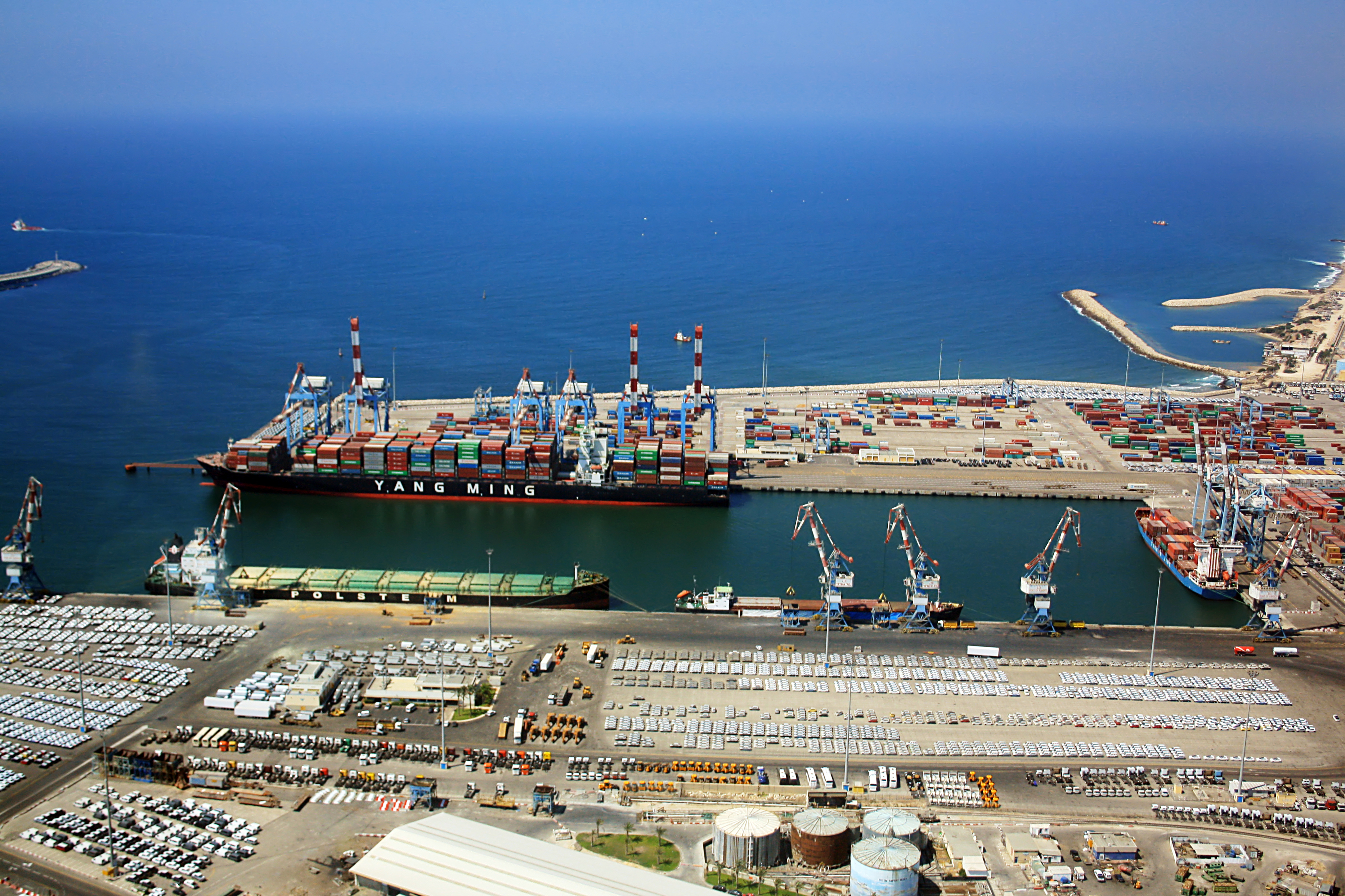 נמל אשדוד.